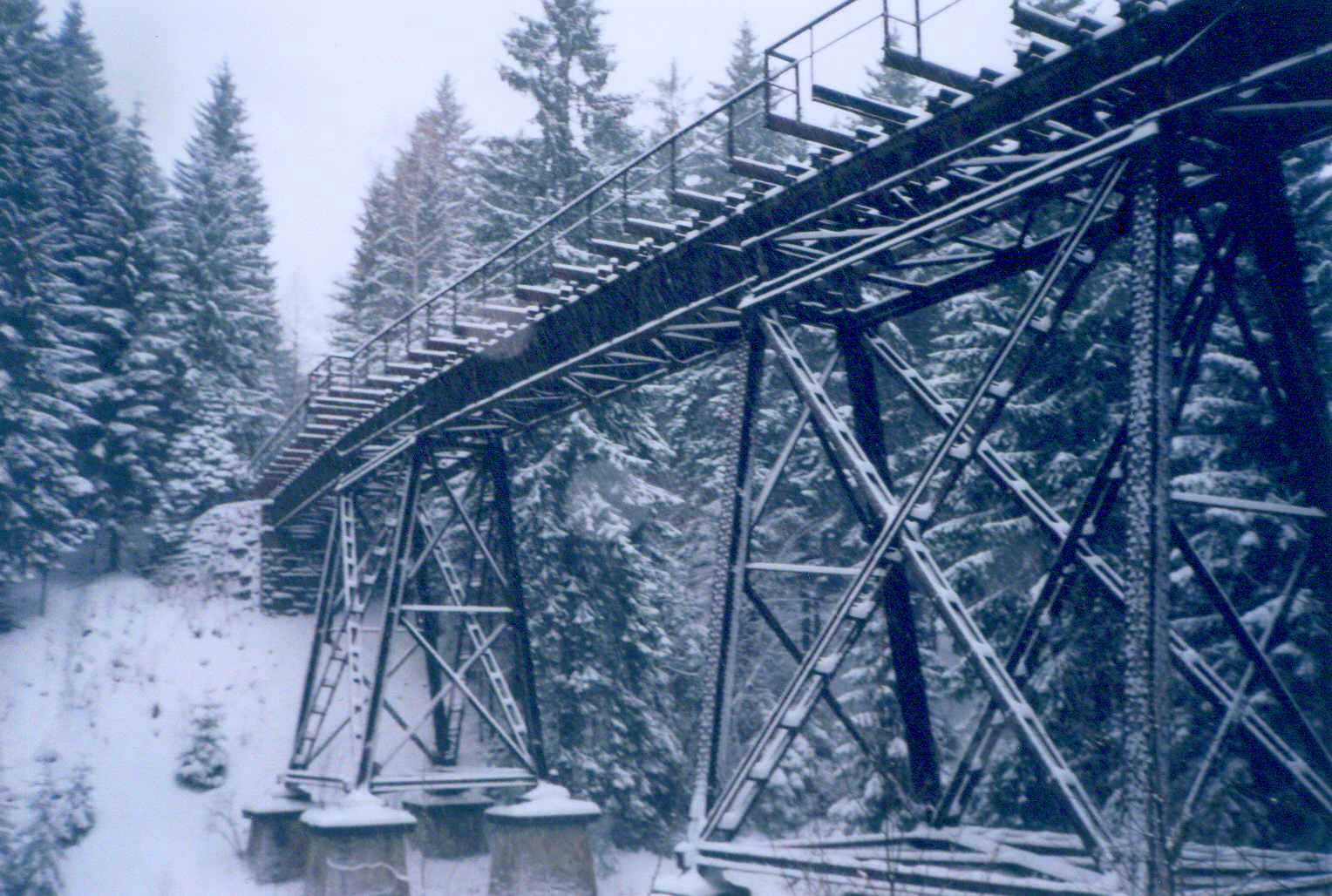 Fuchsbrunnbrücke der Bahnstrecke Zwönitz–Scheibenberg am Streckenkilometer 4,004 im Winter 1999